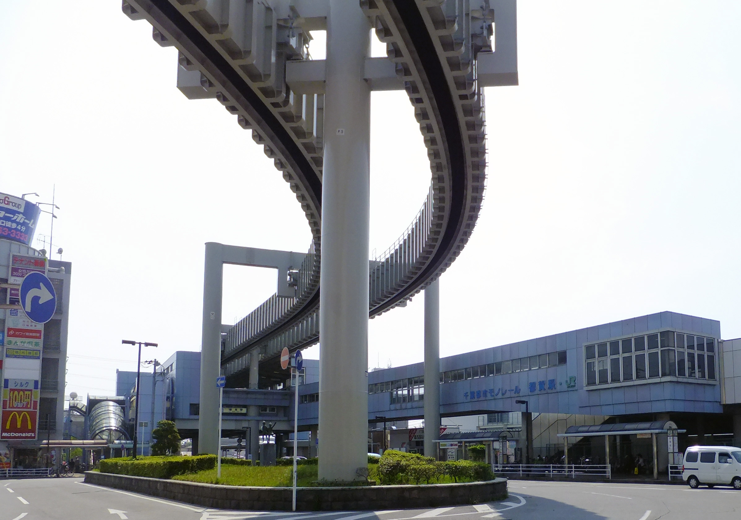 都賀駅東口ロータリー(cropped)